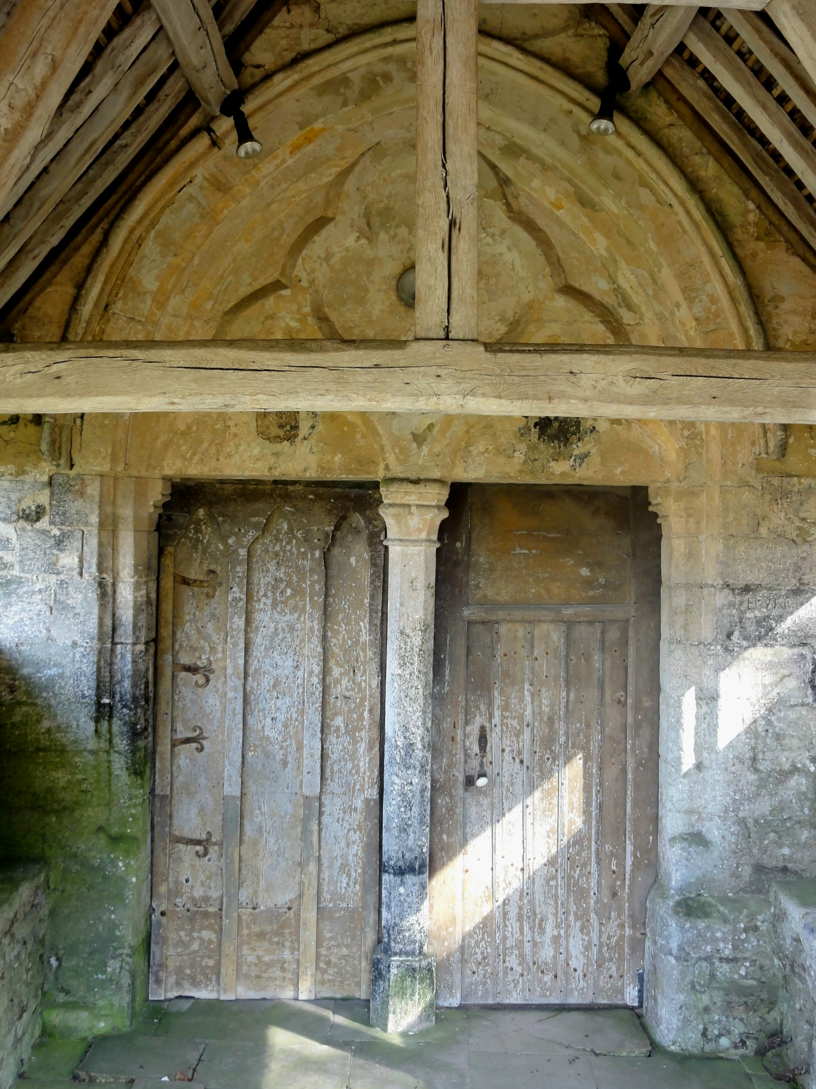 Portail occidental.